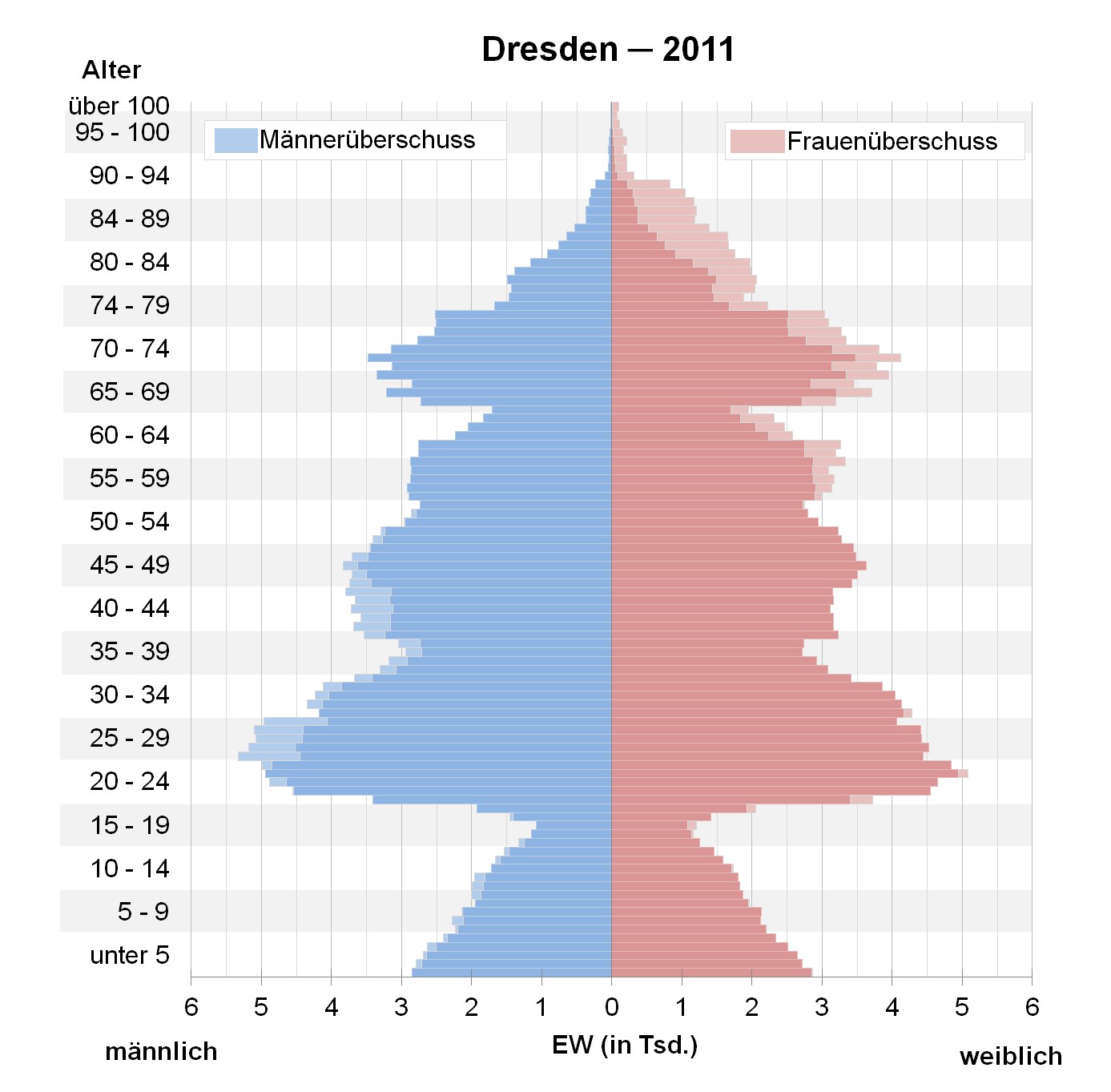 Bevölkerungspyramide der Stadt Dresden nach Zensus 2011.